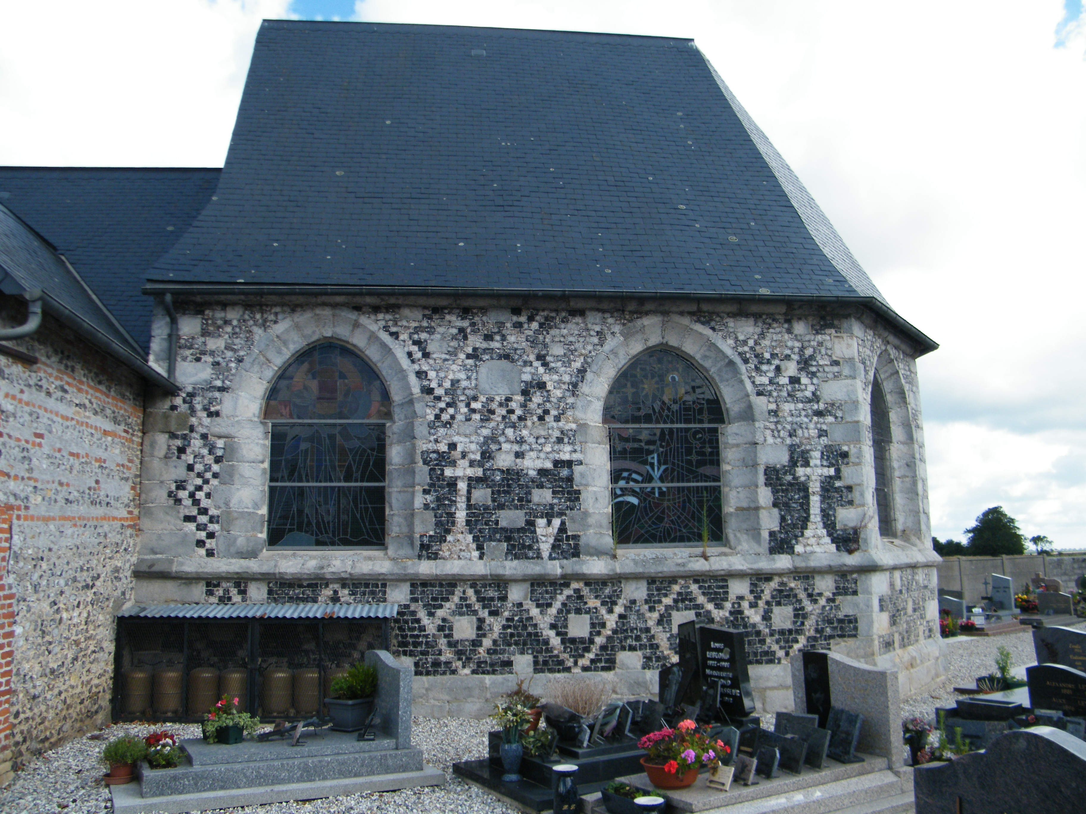 Grèges, Seine-Maritime, France, église